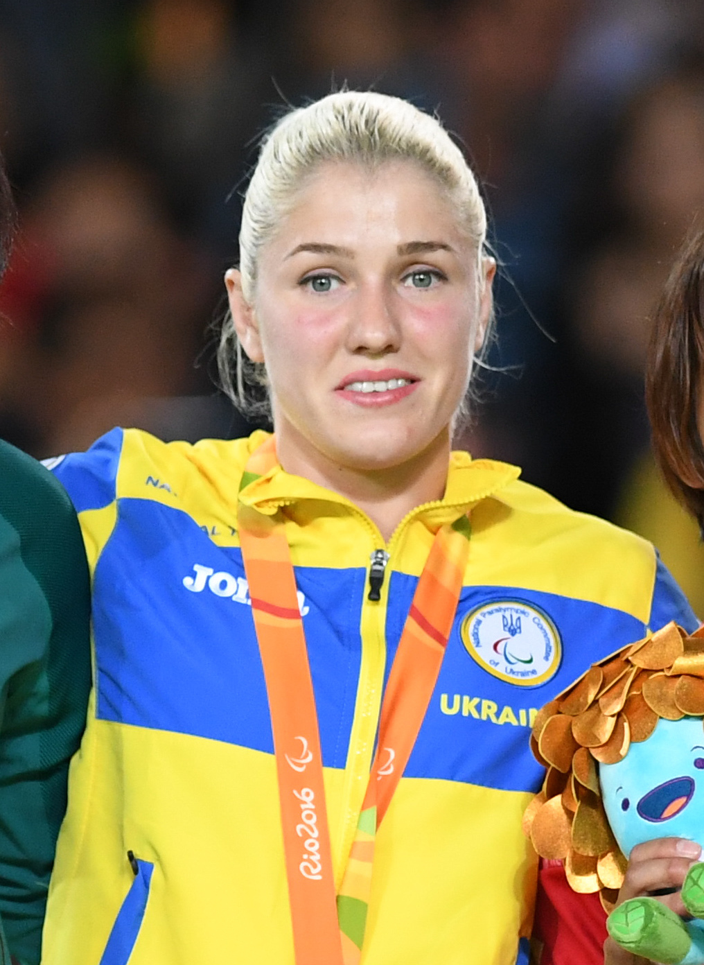 Rio de Janeiro - A brasileira Lucia Araújo perde para a ucraniana Inna Cherniak na final do judô feminino 57kg e fica com a medalha de prata na Paralímpiada Rio 2016 (Tânia Rêgo/Agência Brasil)